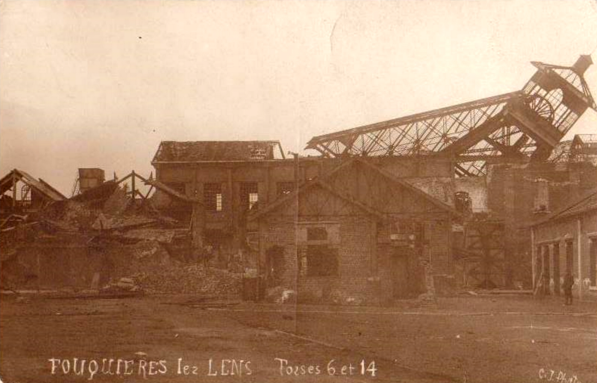 La Fosse n° 6 - 14 dite Alfred Dupont de la Compagnie des mines de Courrières était un charbonnage constitué de deux puits situé à Fouquières-lez-Lens, Pas-de-Calais, Nord-Pas-de-Calais, France.